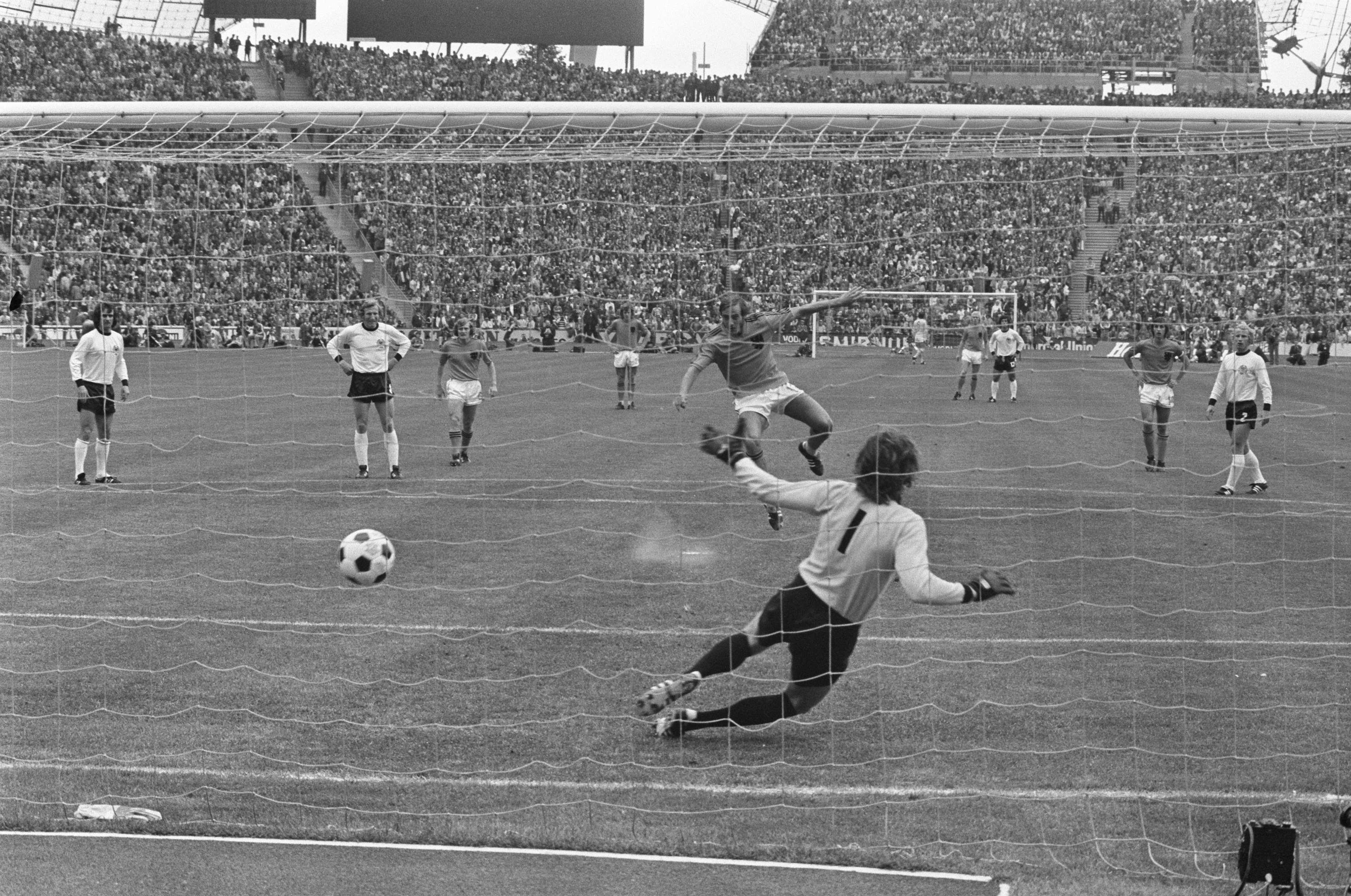 Collectie / Archief : Fotocollectie Anefo Reportage / Serie : [ onbekend ] Beschrijving : Finale wereldkampioenschap voetbal 1974 in Munchen, West Duitsland tegen Nederland 2-1; Neeskens scoort uit penalty 0-1, keeper Maier is kansloos Datum : 7 juli 1974 Locatie : München, Nederland, West-Duitsland Trefwoorden : finales, keepers, sport, voetbal, wereldkampioenschappen Fotograaf : Verhoeff, Bert / Anefo Auteursrechthebbende : Nationaal Archief Materiaalsoort : Negatief (zwart/wit) Nummer archiefinventaris : bekijk toegang 2.24.01.05 Bestanddeelnummer : 927-3074